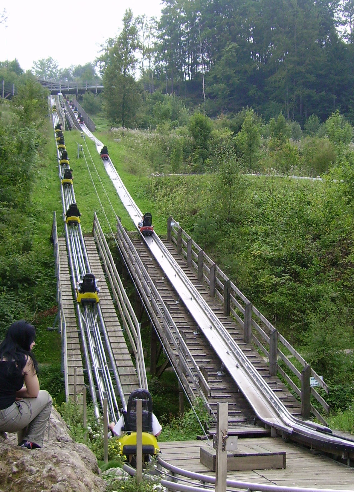 Sommerrodelbahn bei Pottenstein, Oberfranken, Bayern, Deutschland